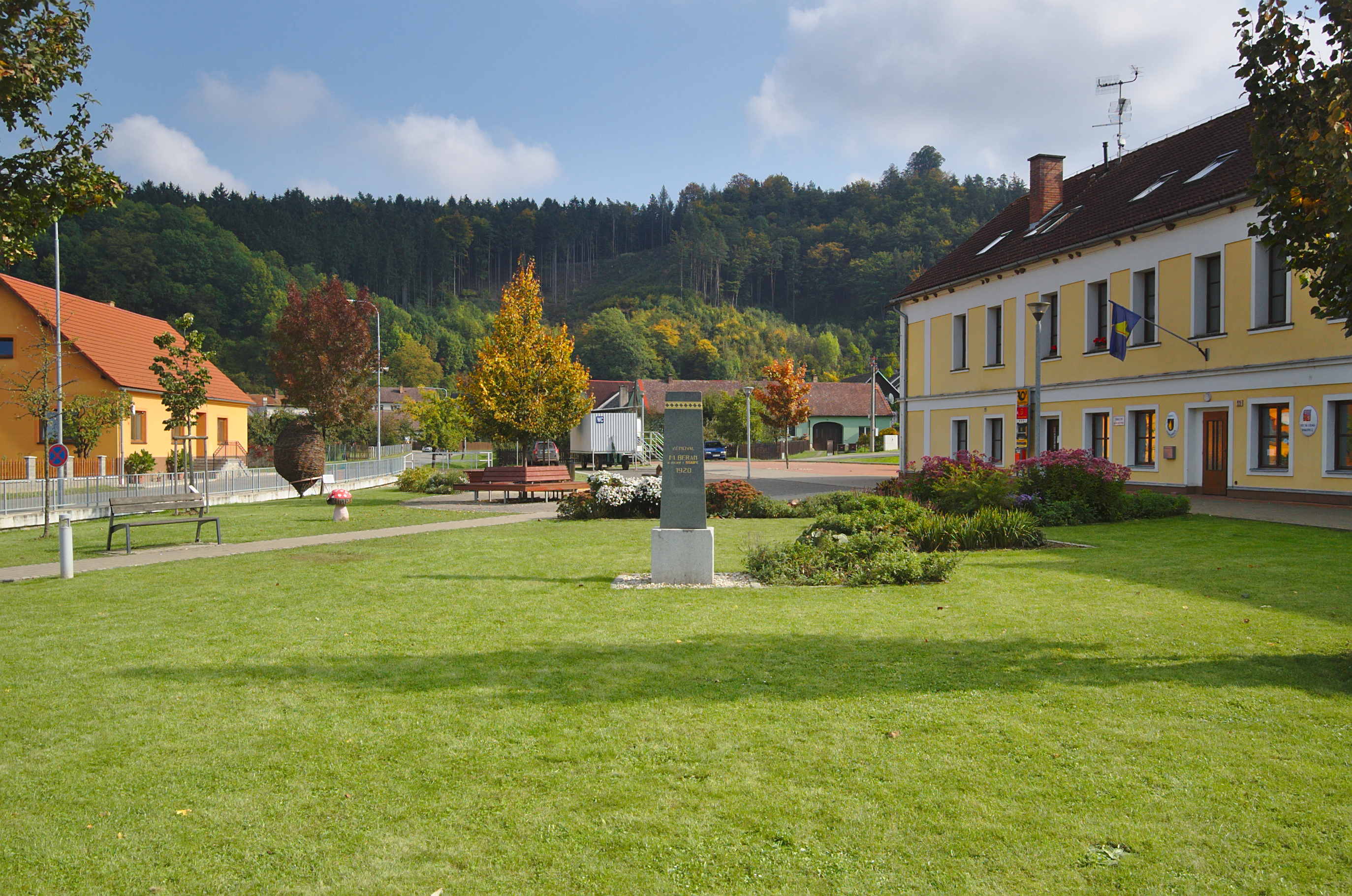 Náves, Biskupice, okres Svitavy